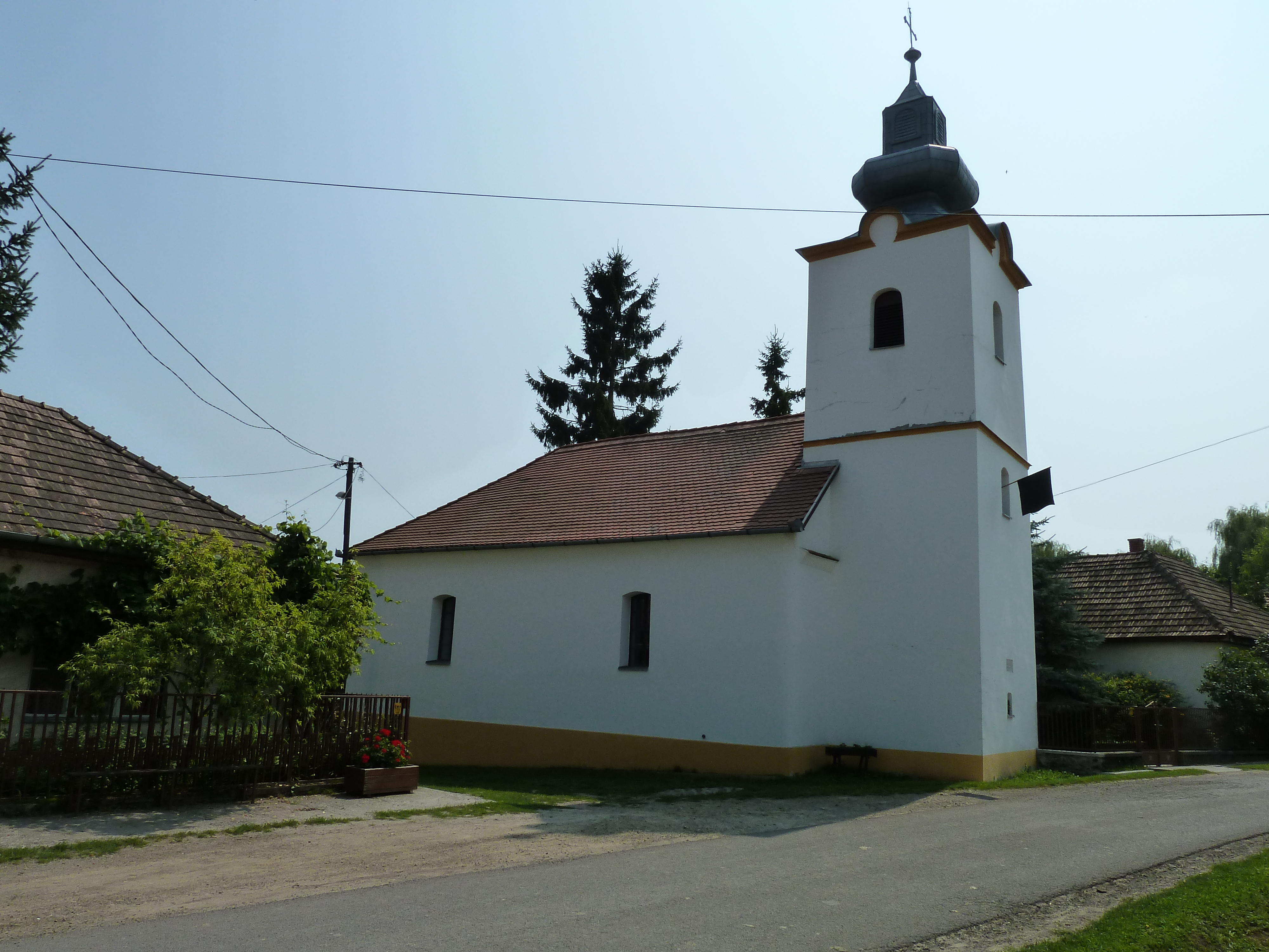 Bokor, evangélikus templom. This is a photo of a monument in Hungary, Identifier: 6542